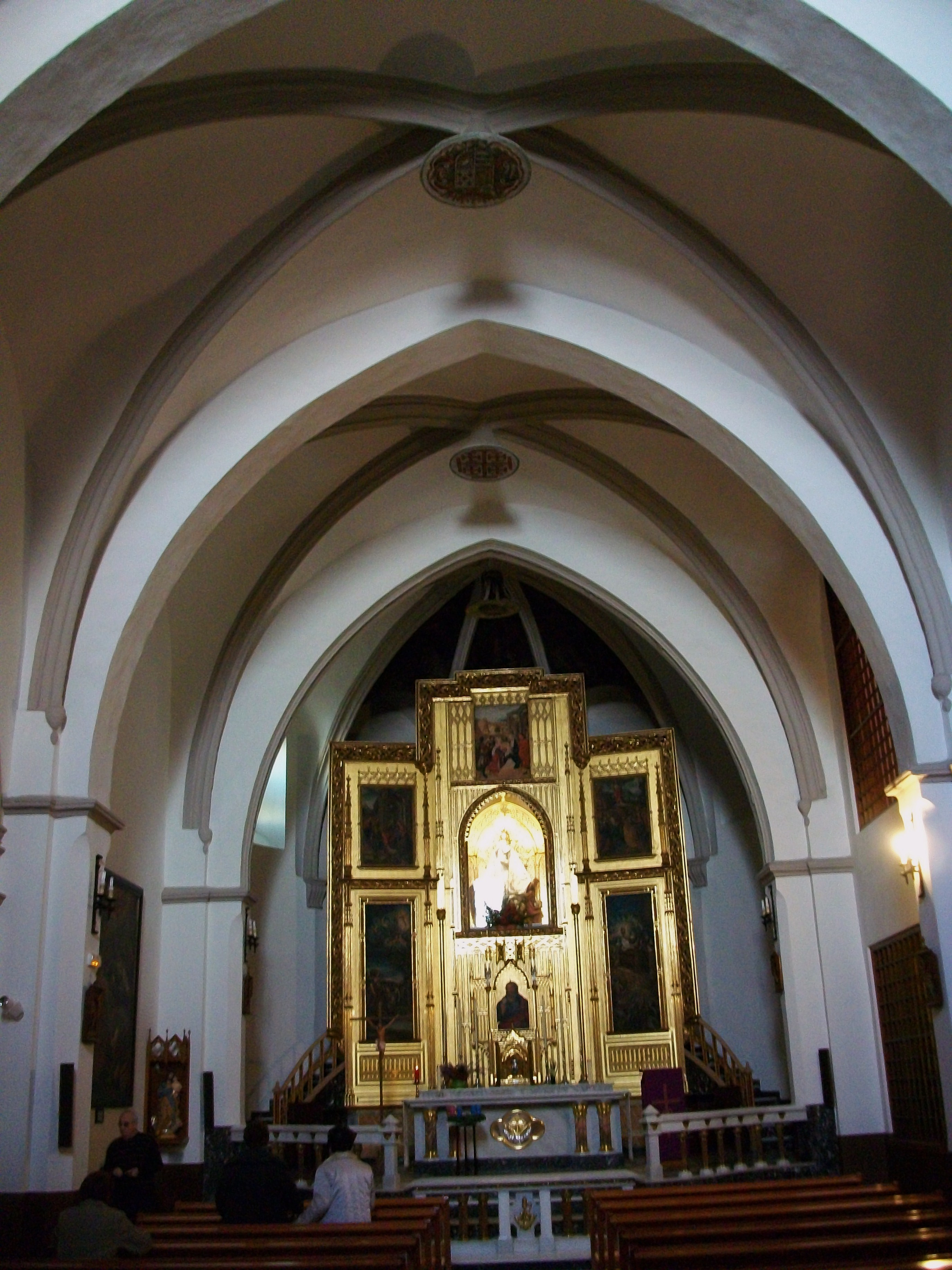 Interior de l'església del convent de santa Clara de Gandia.